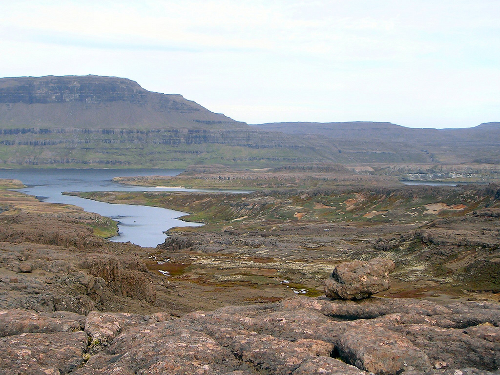 Port Couvreux, Kerguelen Islands